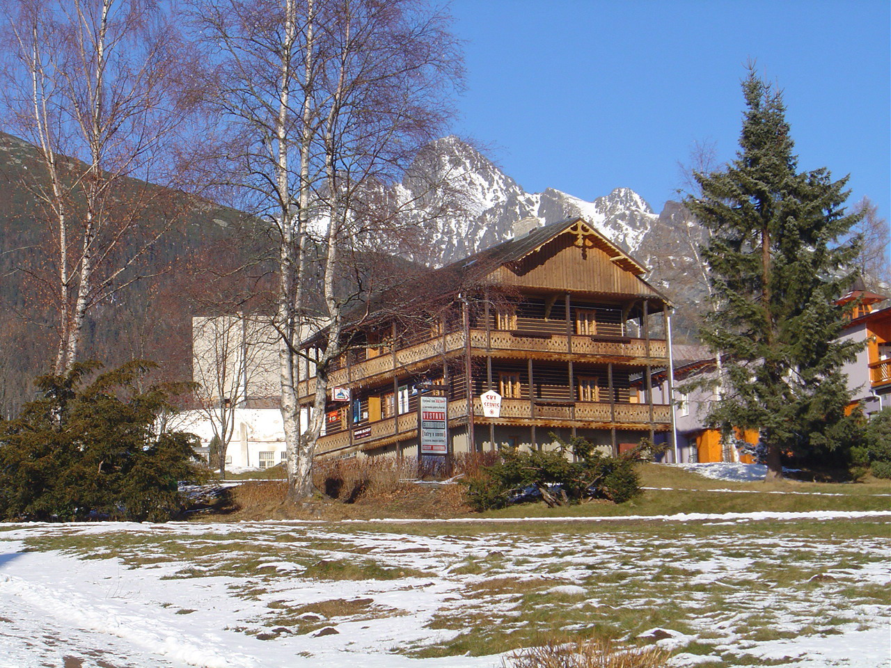 Centre of Starý Smokovec